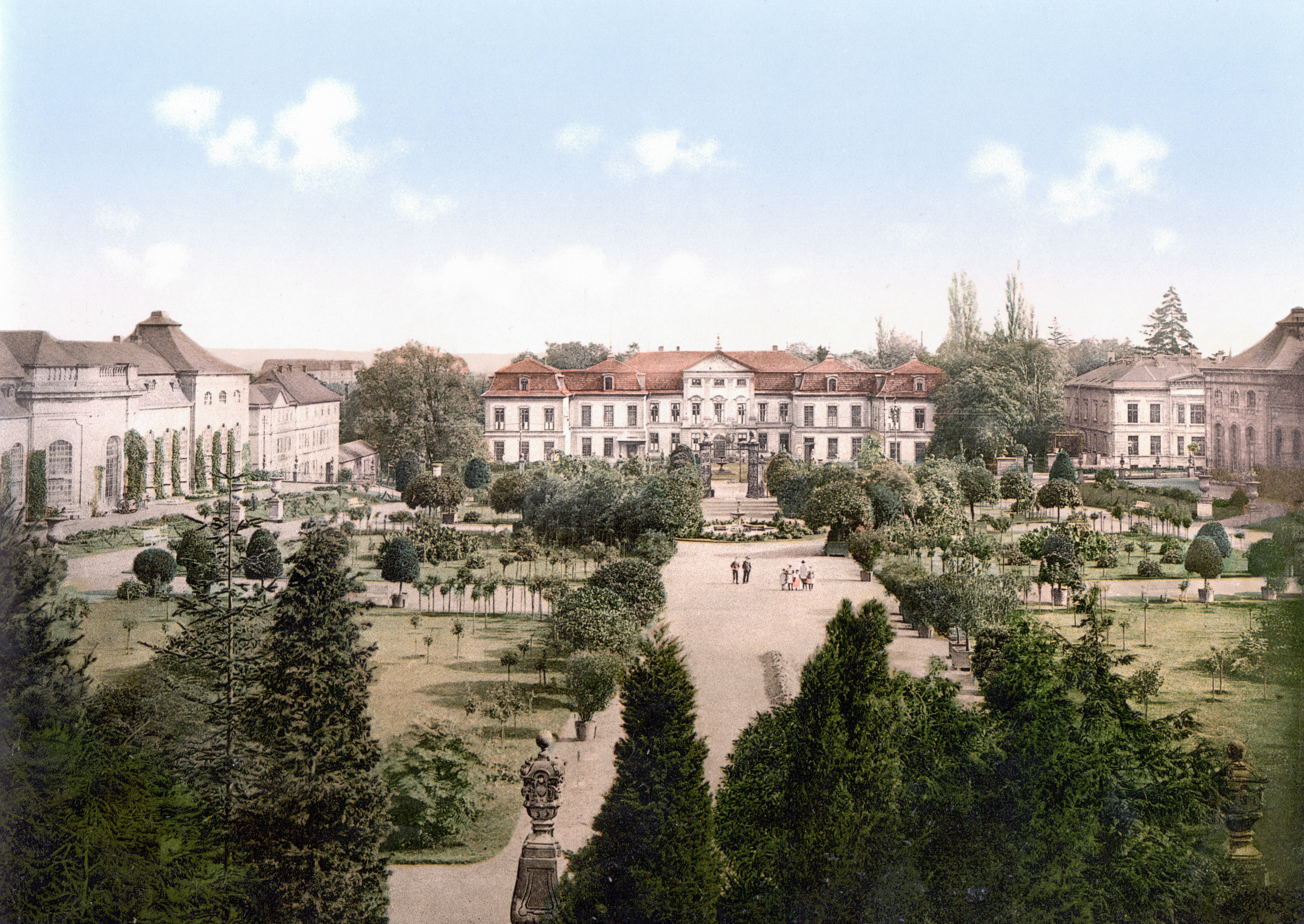 Gotha Orangeriegarten um 1900